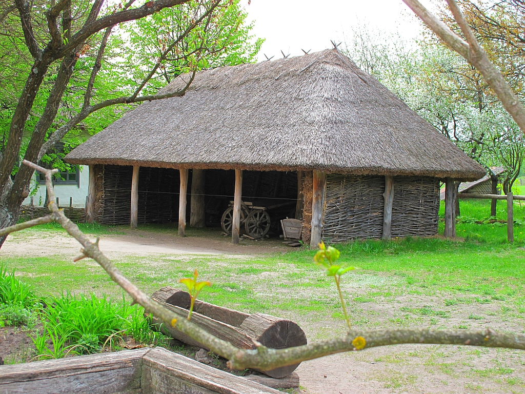 транспортныйОТДЕЛ